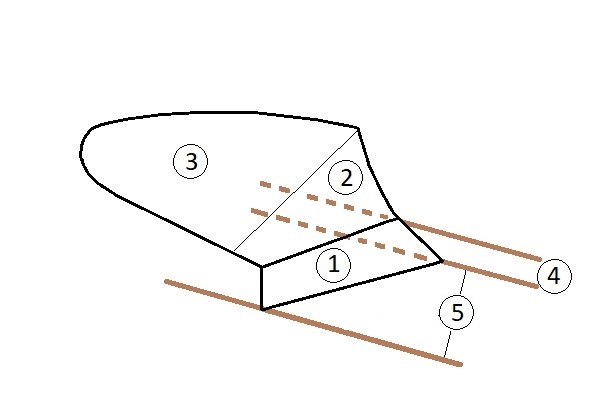 Vertedera de un arado de reja y vertedera, con explicación de sus partes.